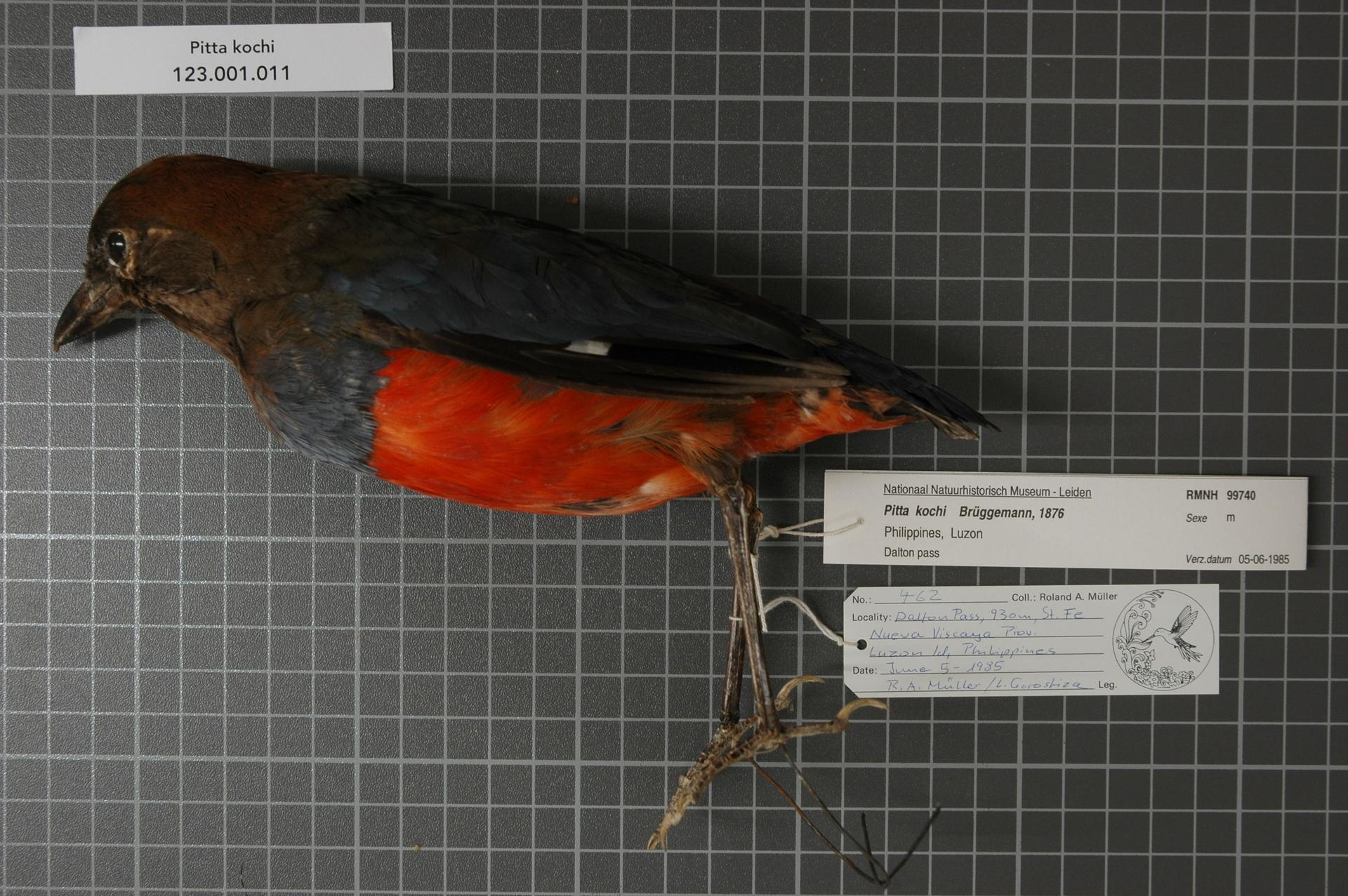 Pitta kochi Bruggemann, 1876